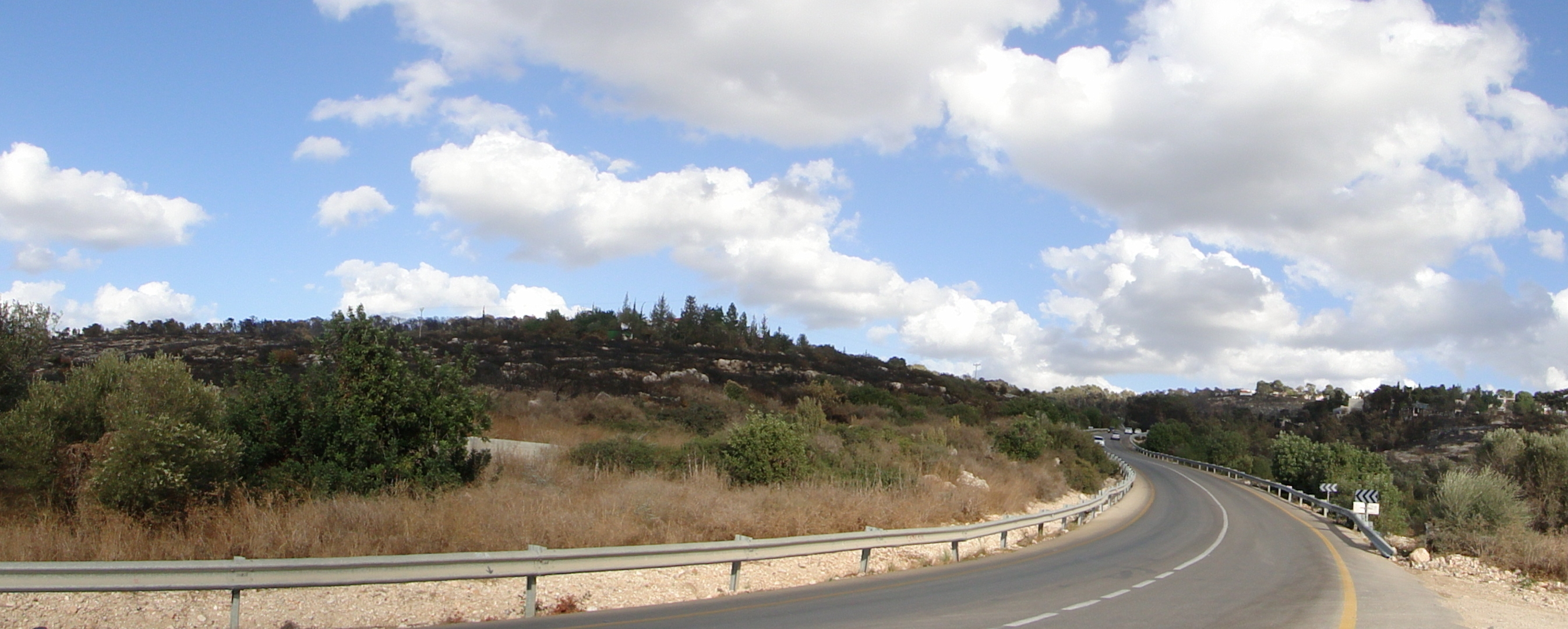 Mount Carmel Israel, after 2010 fire הכרמל לאחר השריפה בכרמל בחודש דצמבר 2010 טירת כרמל היא עיר במחוז חיפה בישראל ממוקמת במורדות המערביים של הר הכרמל בין שכונת דניה בחיפה לכפר גלים, בסמוך לכביש 4, הכביש הישן מחיפה לתל אביב. Ein Hod area עין הוד מימין, משמאל ימין אורד. לאחר השריפה שהיתה באזור בחודש דצמבר 2010